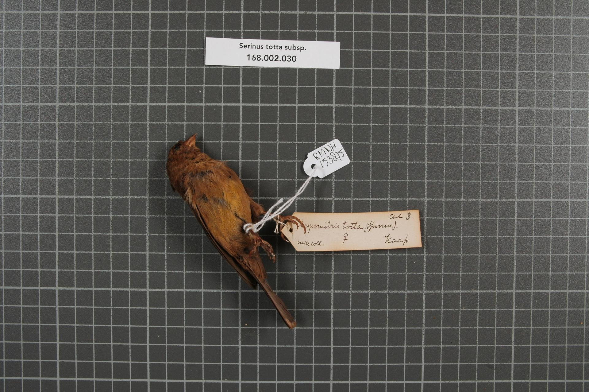 Serinus totta subsp.